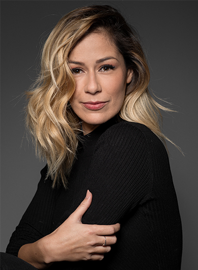 fotografia